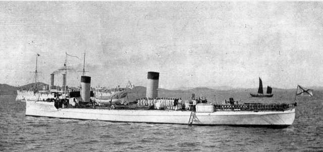 Миноносец «Кит» («Бдительный»).